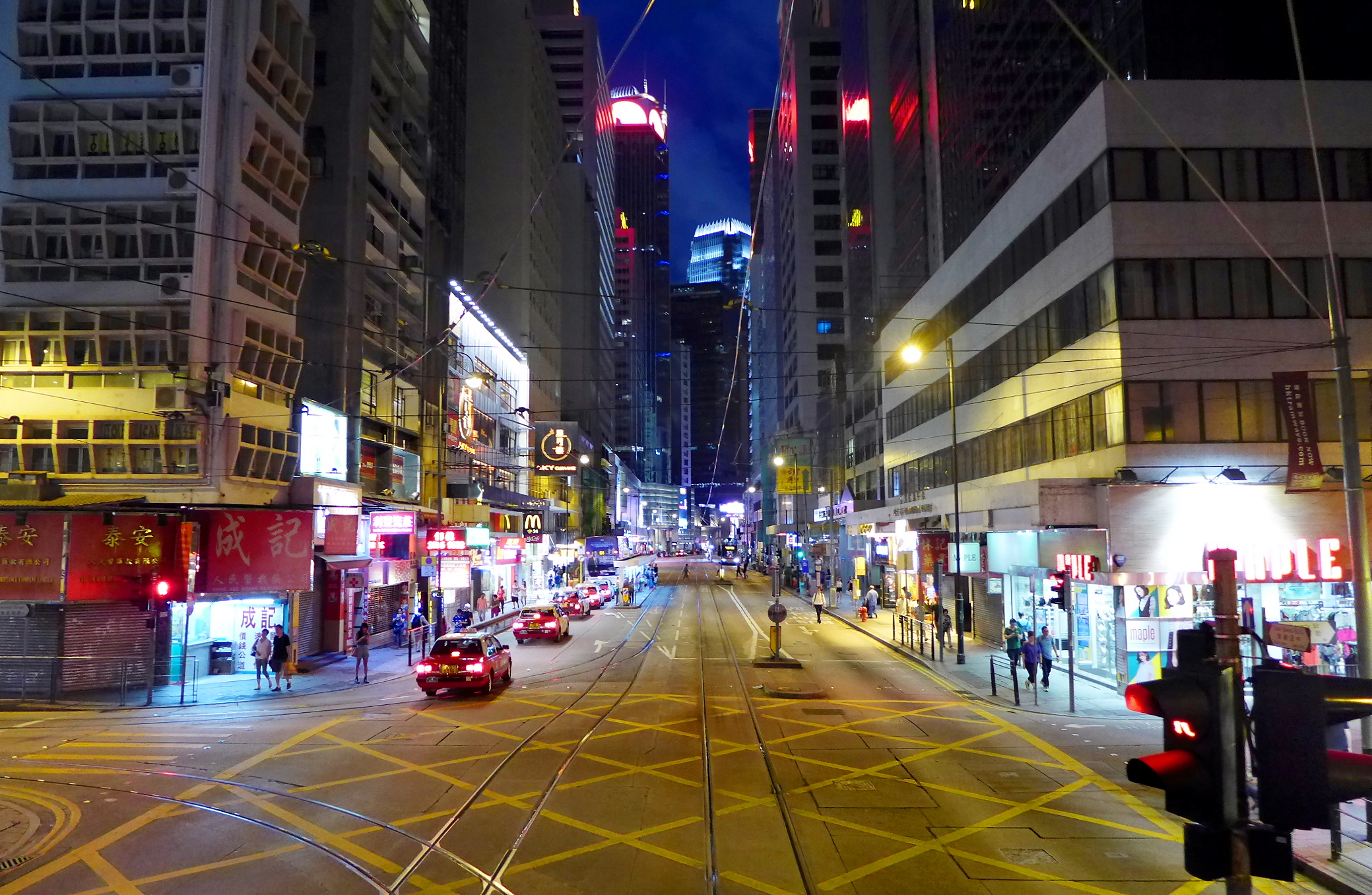 Des Voeux Road Central night view